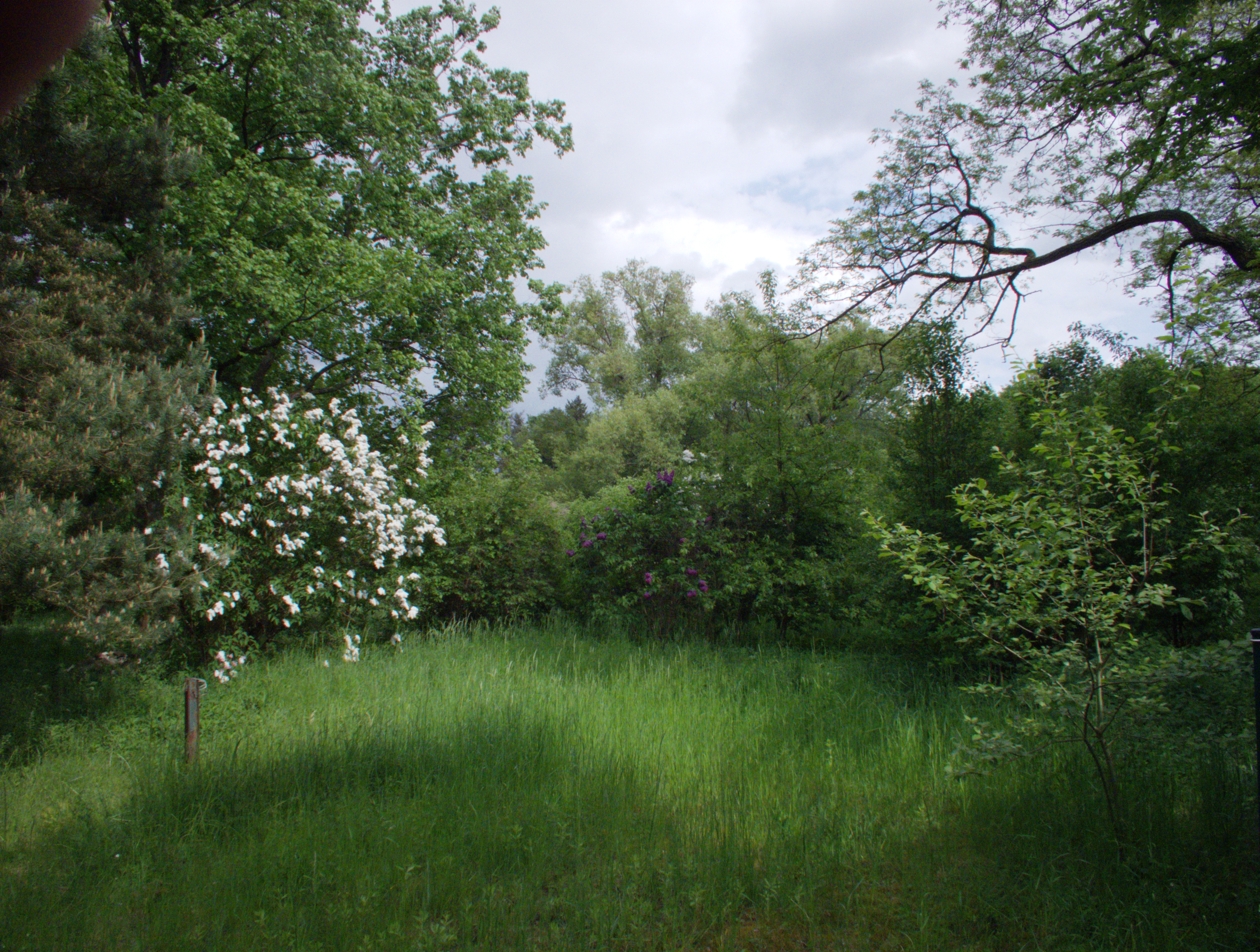 Der Kienpfuhl war bis 1900 ein größerer Pfuhl, bis die Neukölln-Mittenwalder Eisenbahn mitten durch das Gewässer gebaut wurde.Ein großer Teil wurde damals mit Müll und Sand verfüllt. In den zwanziger Jahren des vorherigen Jahrhunderts wurde um ihn rum eine Kleingartenkolonie errichtet. Zwischenzeitlich wurde der Pfuhl von einem Anglerverein als Lebend-Fischfutterquelle genutzt. Durch eine Müllkippe änderte sich seit den siebziger Jahren die natürliche Topographie des Pfuhls durch Aufschüttungen. Darüber hinaus wurden Teile des geschützten Wiesenbereich für eine Parkplatz und für Veranstaltungen zweckentfremdet.